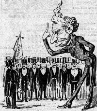 Sagasta caricatura